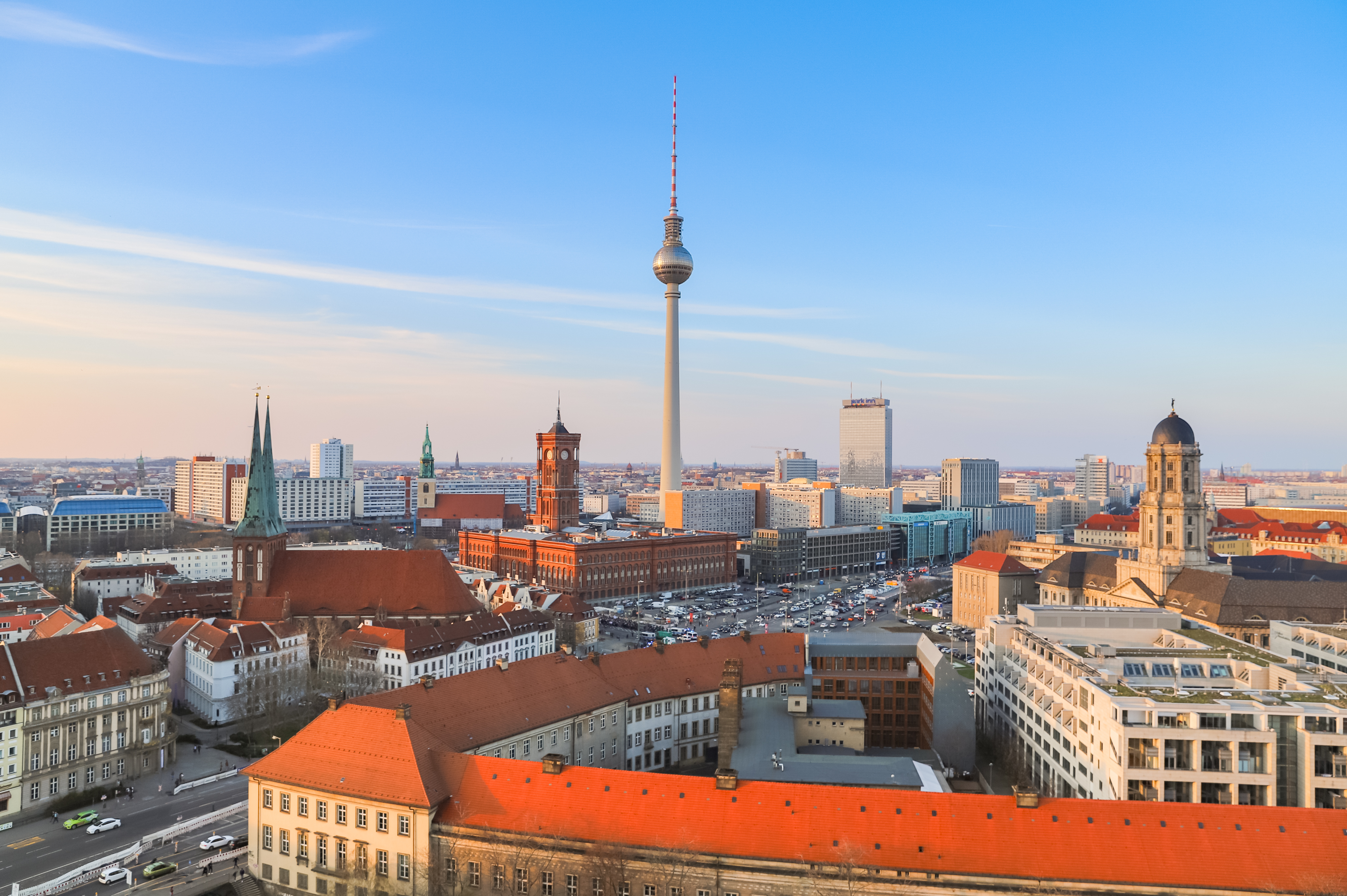 Berlin Tag und Nacht